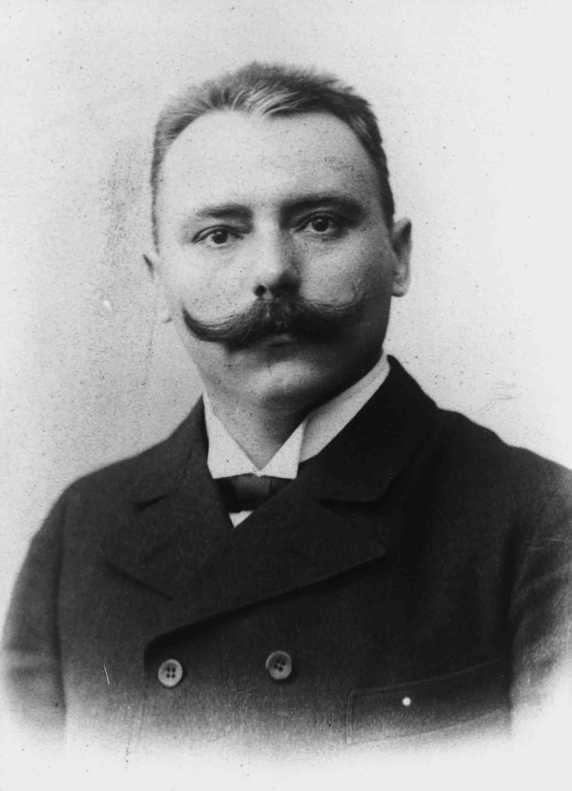 Albert Hahl (1868-1945), Gouverneur vu Dytsch-Neigunea 1901-14